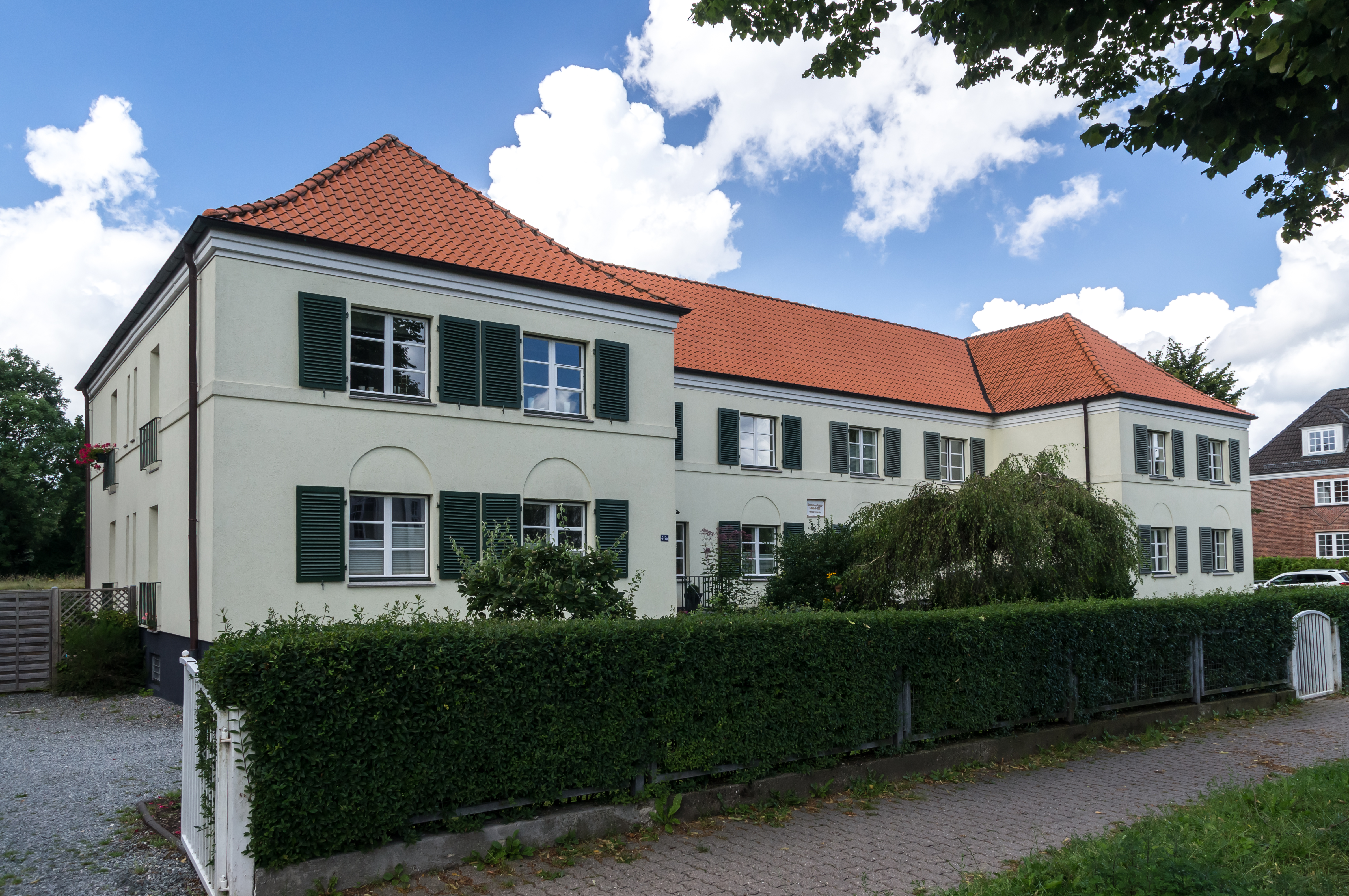 Flensburg-Westliche Höhe; Nerongsallee 46-46a; Heinrich- und Minna-Schuldt-Stift; Denkmal-Nr. 36